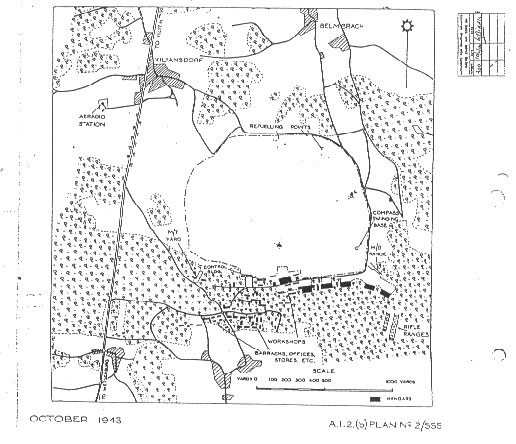 Angriffspläne der US-Streitkräfte auf die heutige Otto-Lilienthal-Kaserne bei Roth